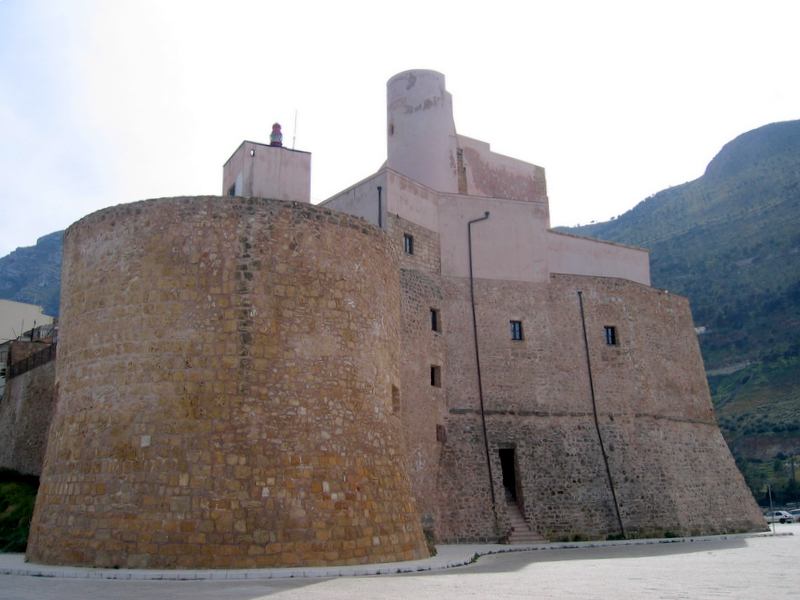 Il castello di Castellammare del Golfo, Sicily, Italy